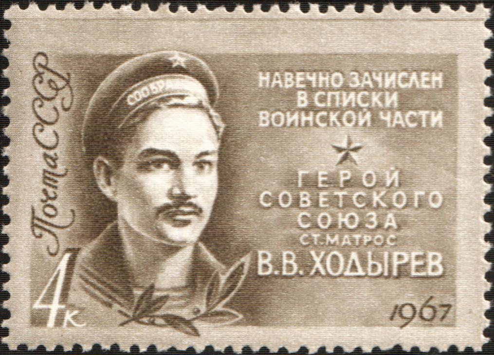 Герой Советского Союза гвардии ст. матрос В. В. Ходырев (1923-1944). Художник: В. Пименов. Марка СССР, номинал - 4коп.